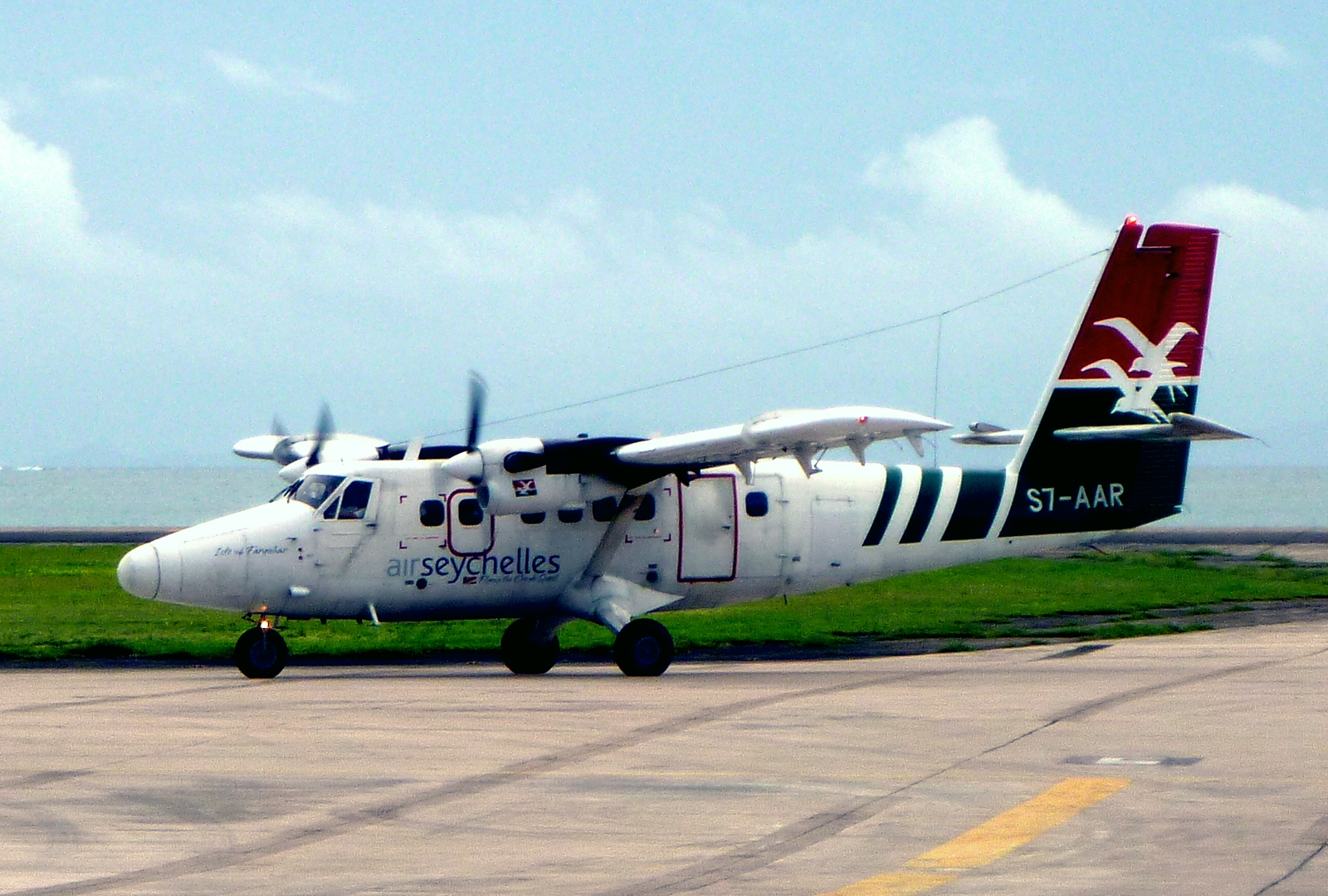 Twin Otter S7-AAR der Air Seychelles auf dem Flughafen von Victoria